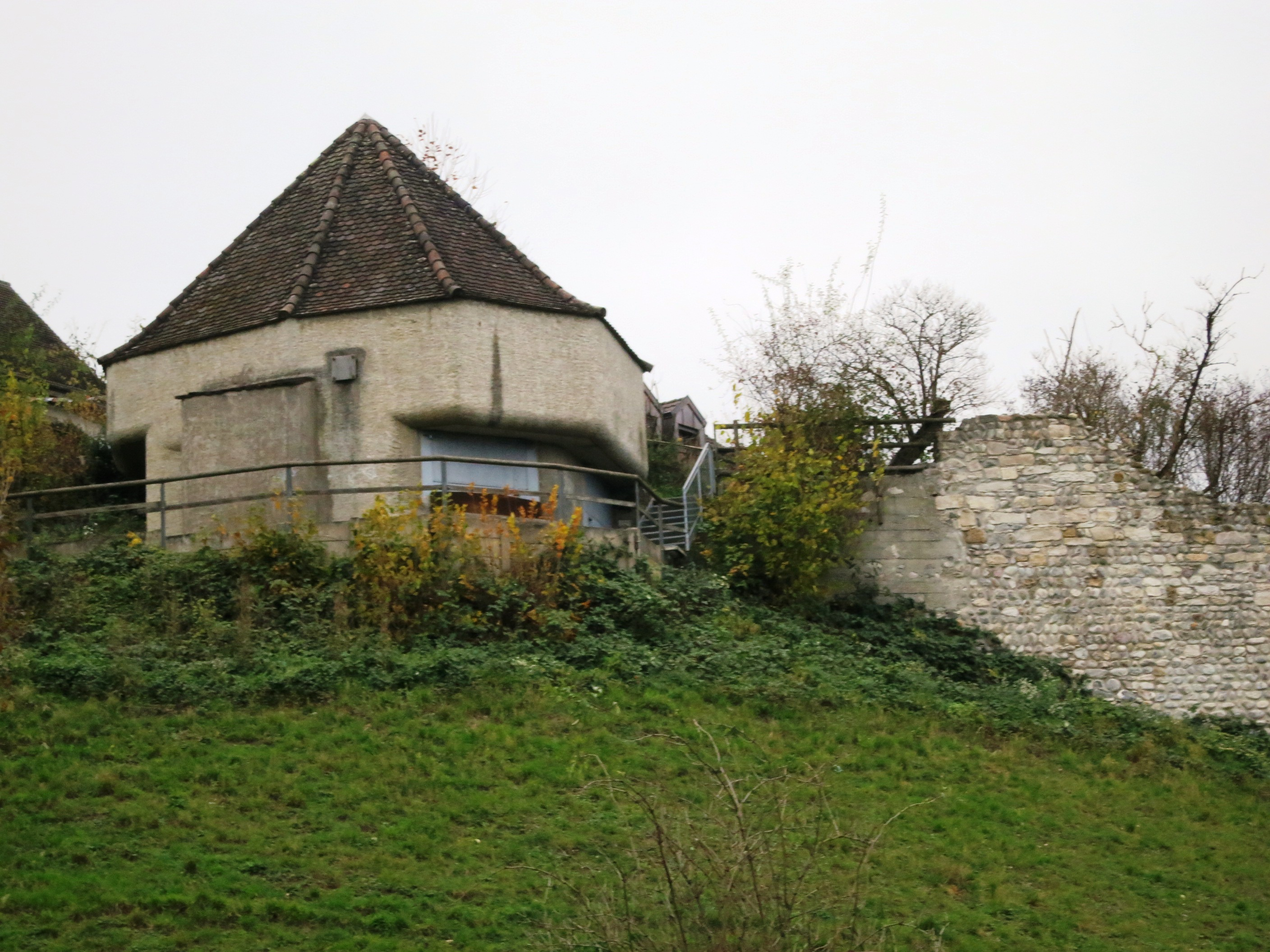 Stadtmauer um 1290 Neu-Rheinau mit Räbhüsli-Bunker, Rheinau ZH, Schweiz: Mg-Stand Räbhüsli A 5461 Rheinau